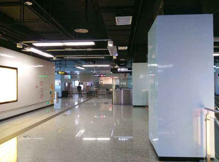 谈渡桥站的内景